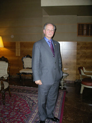 Juan Mª Atutxa en el "Hotel 3 Reyes" de Pamplona a la entrada de una conferencia sobre los 25 años de la LORAFNA, organizada por la Fundación Sabino Arana.